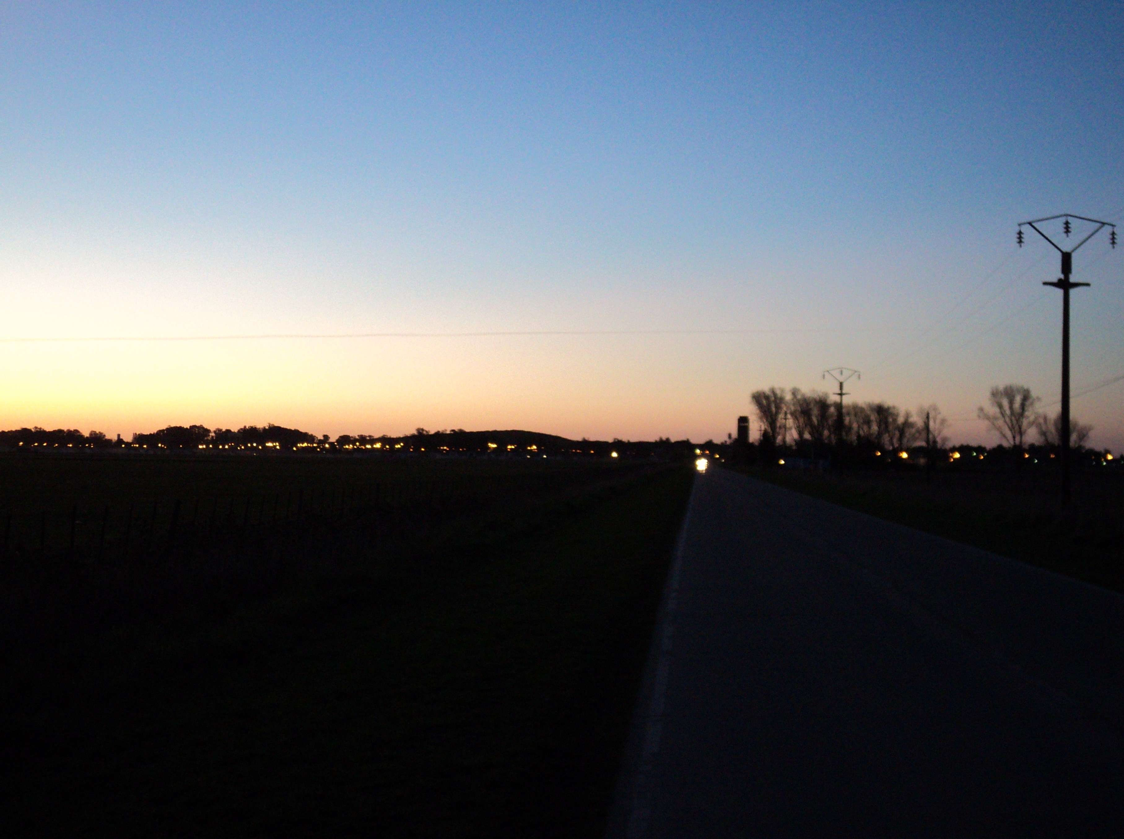 panoramica desde el ingreso a sierra chica